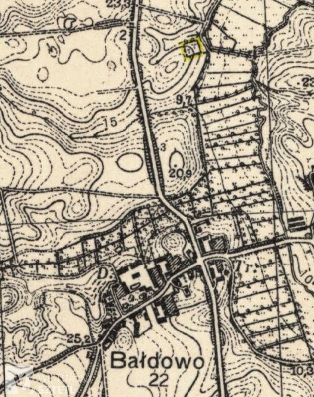 Kirkut w Bałdowie